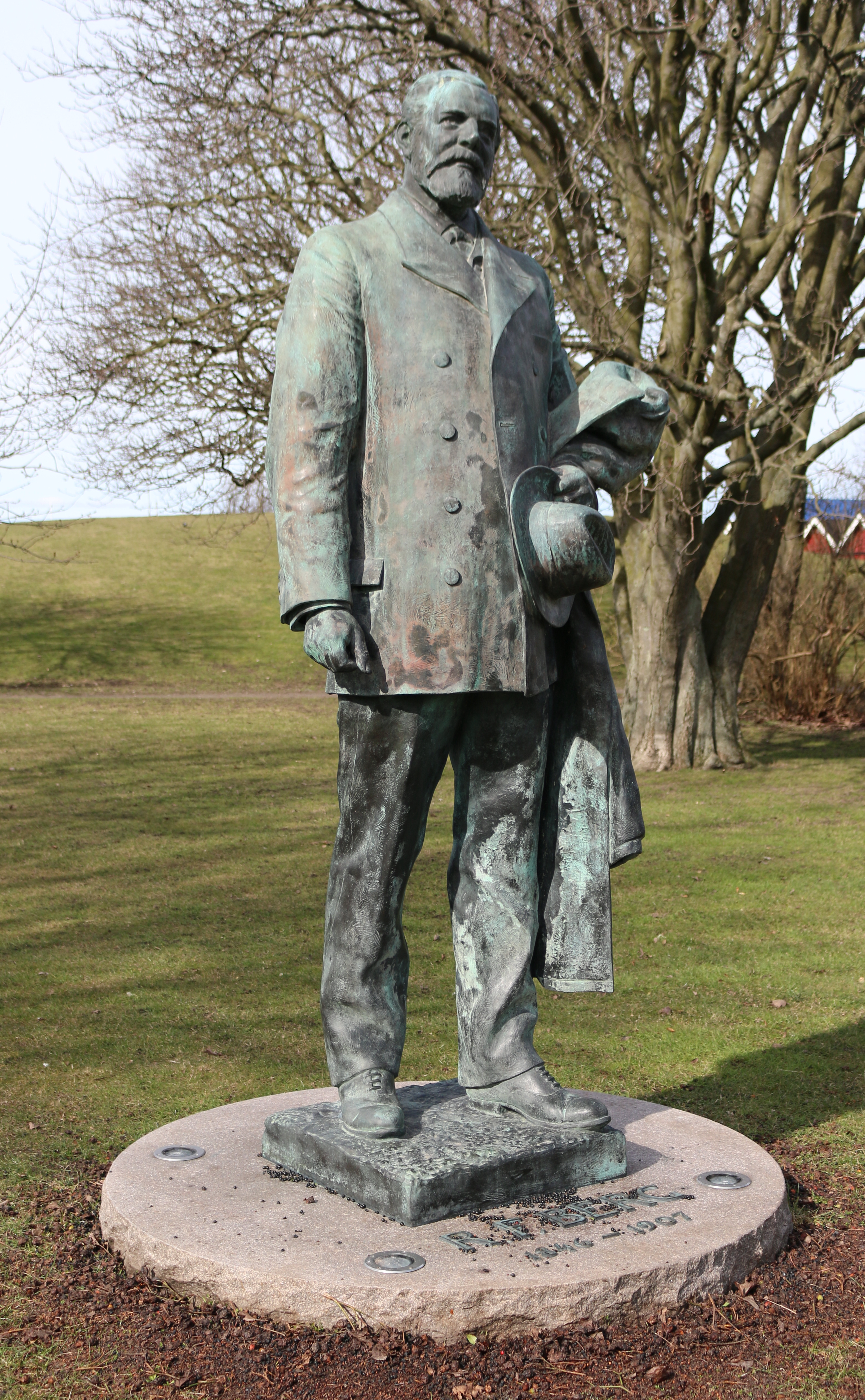 RF Berg av Edvard Trulsson, skulptur i Limhamn, Malmö